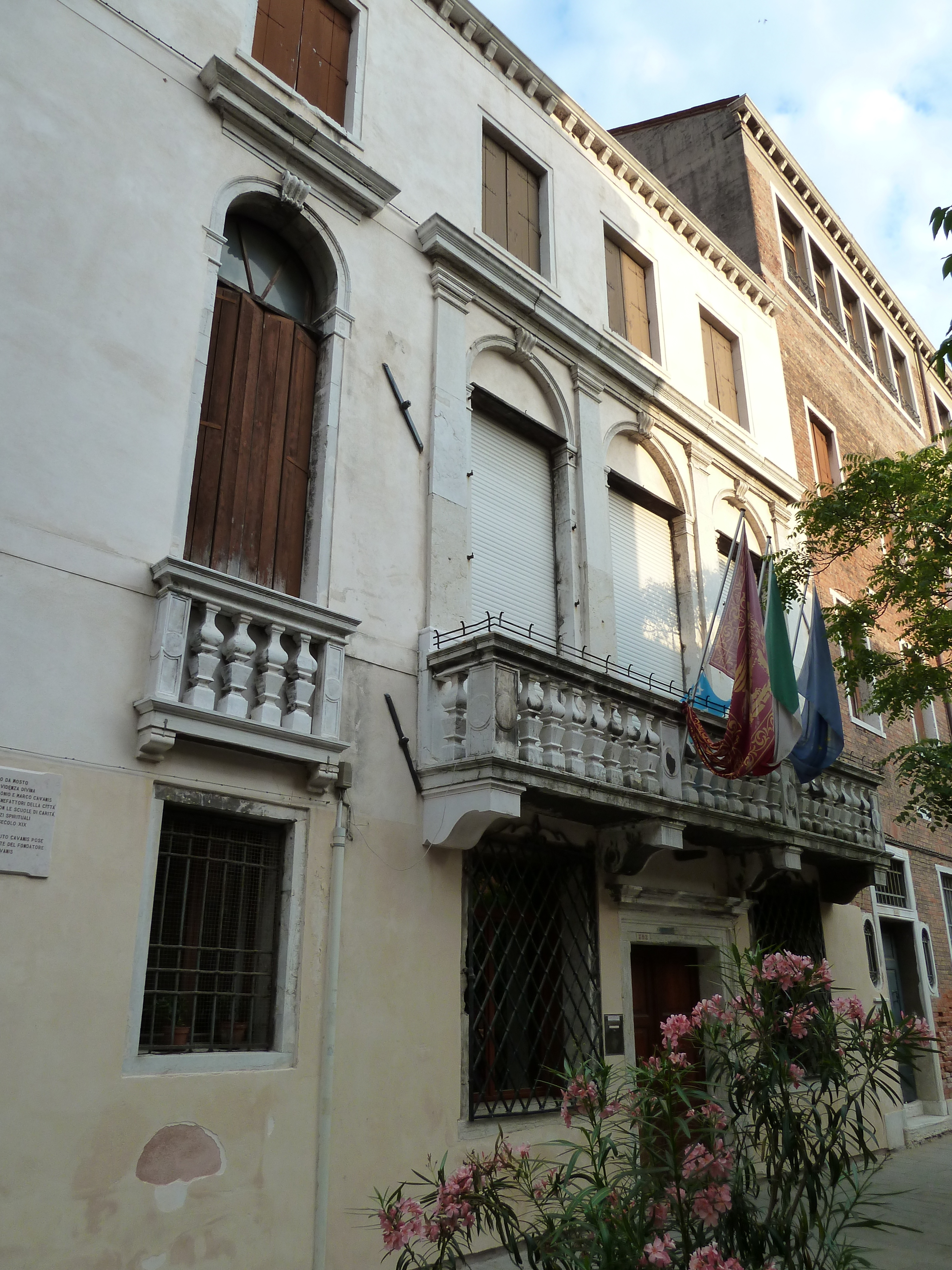 Rio terà Antonio Foscarini (Venice)